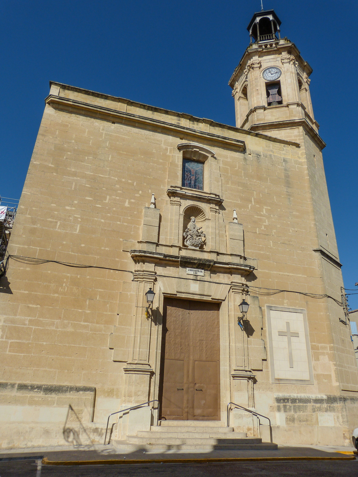 Església de l'Assumpció de la Pobla del Duc (la Vall d'Albaida, País Valencià).